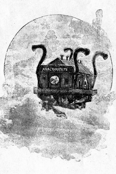 Ilustración de El anacronópete «Tanto esta cubierta como las ilustraciones de texto fueron realizadas cuando sólo tenía 17 años por el pintor y dibujante catalán Gómez Soler, nacido en 1870 y fallecido en 1899, que dedicó la mayor parte de su corta vida a trabajar como ilustrador para revistas y editoriales. Poseía un dibujo fino y fácil, de trazo seguro y desenvuelto.» [1]